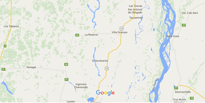 Ubicacion geofráfica de El Sombrerito